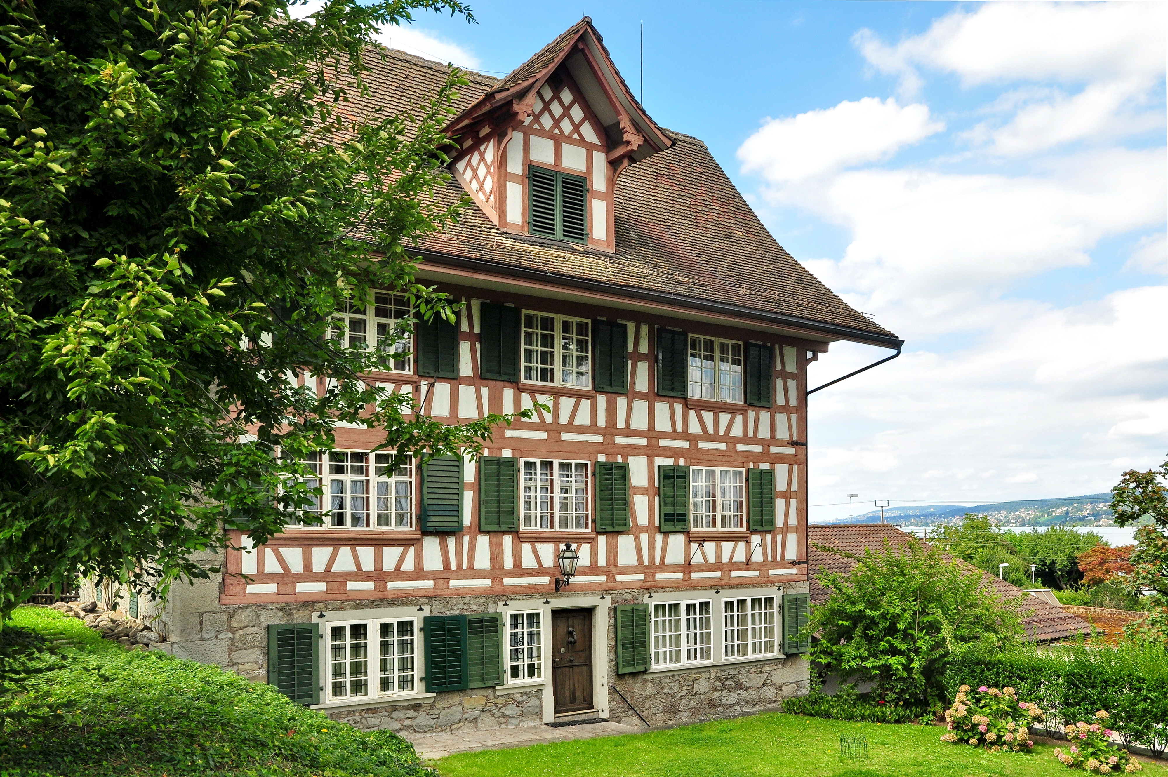 Sogenanntes «Agentenhaus», Seestrasse 175 in Horgen (Switzerland)